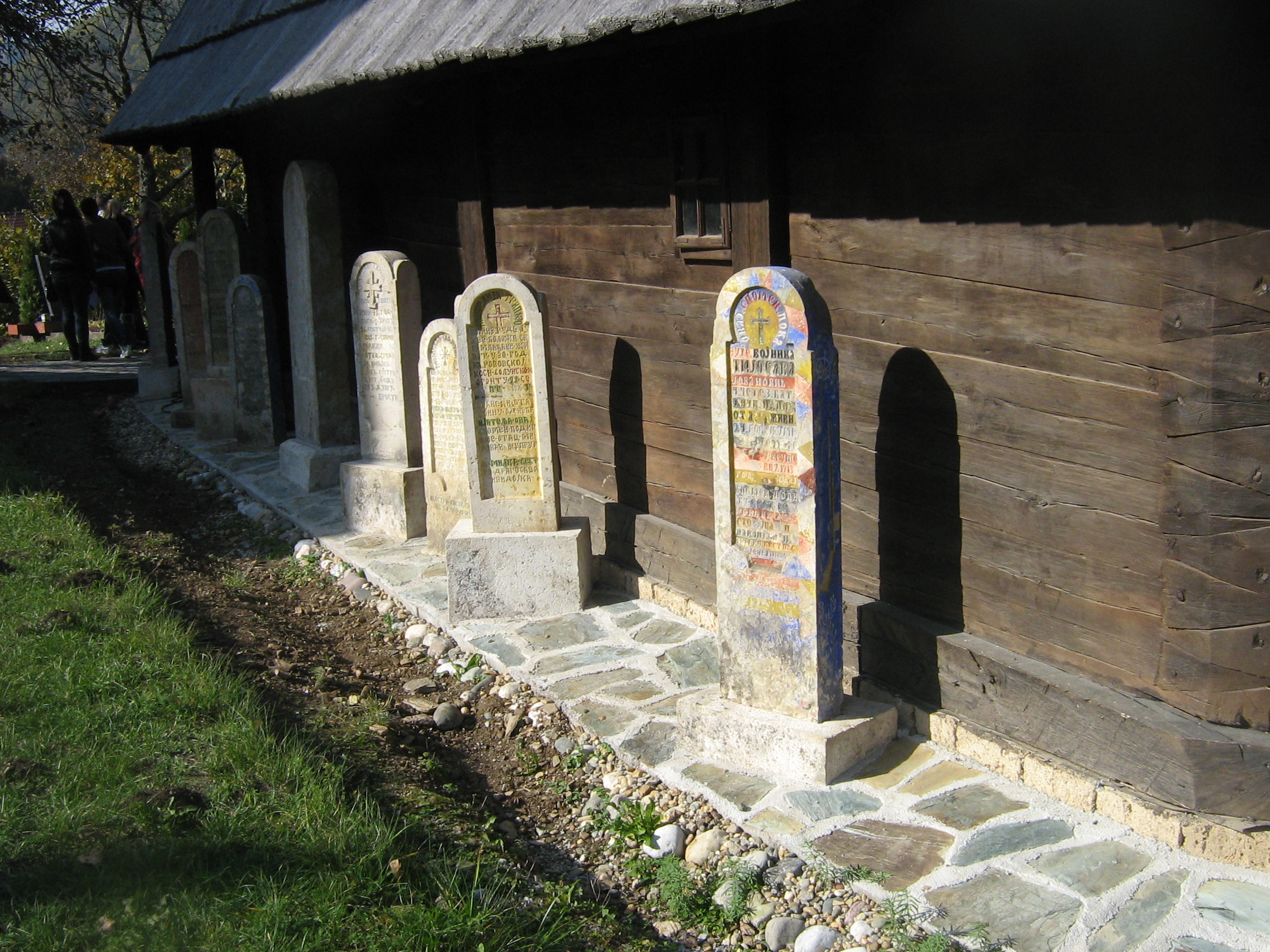 Крајпуташи око цркве у Сечој Реци.